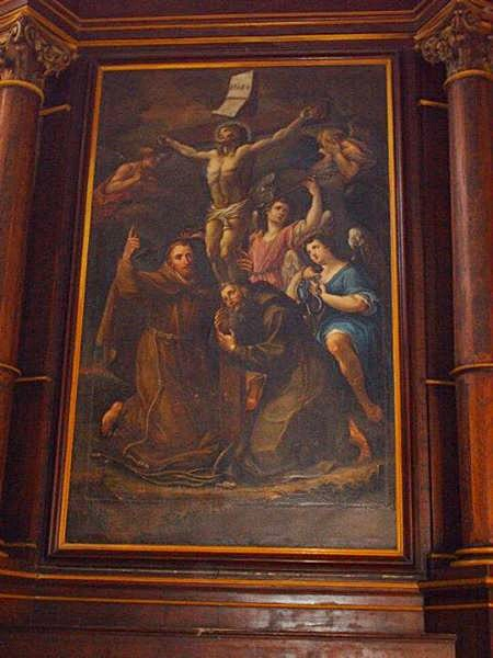 Pala di un altare ligneo laterale